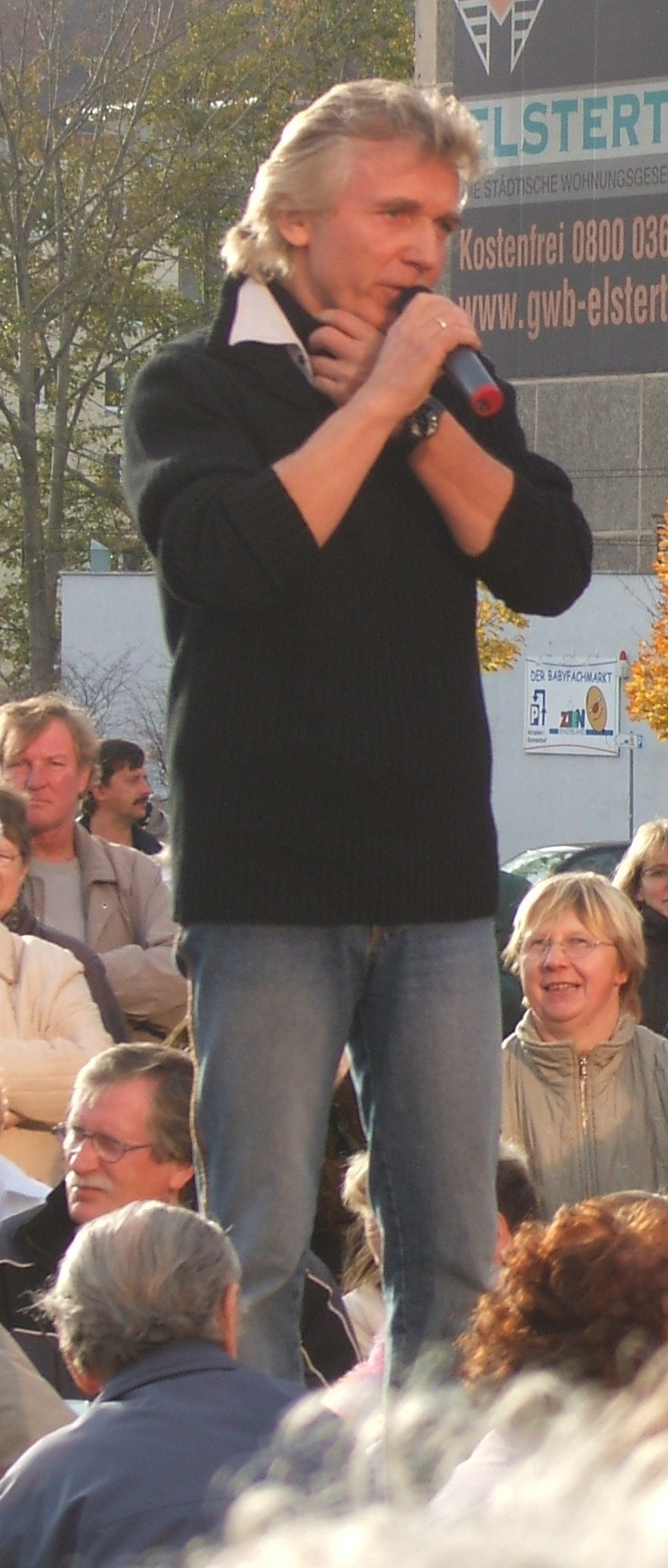 Hartmut Schulze-Gerlach ("Muck"), German singer and TV presenter (Höhlerfest 2008, Gera)